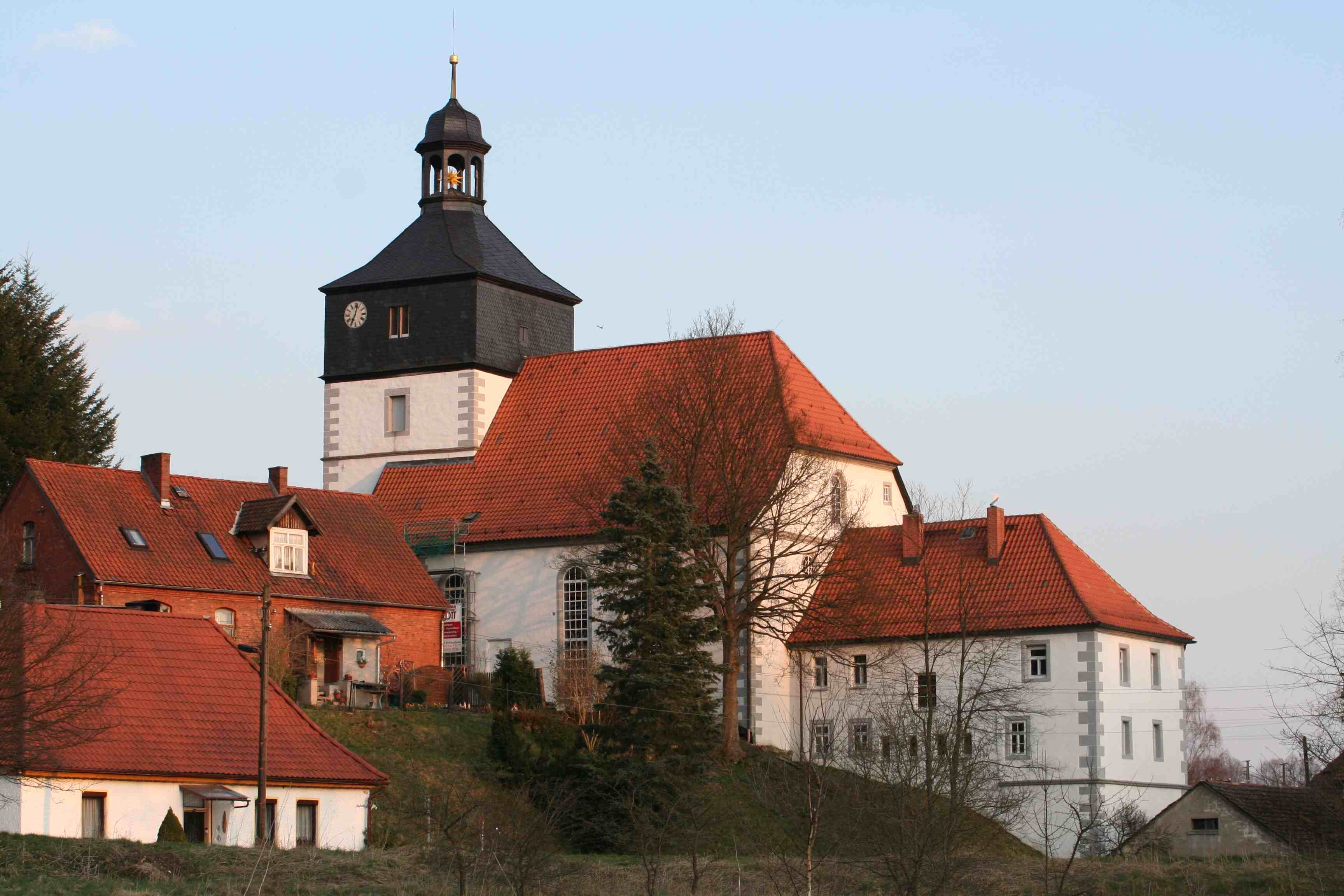 evangelische Kirche in St. Kilian, Landkreis Hildburghausen